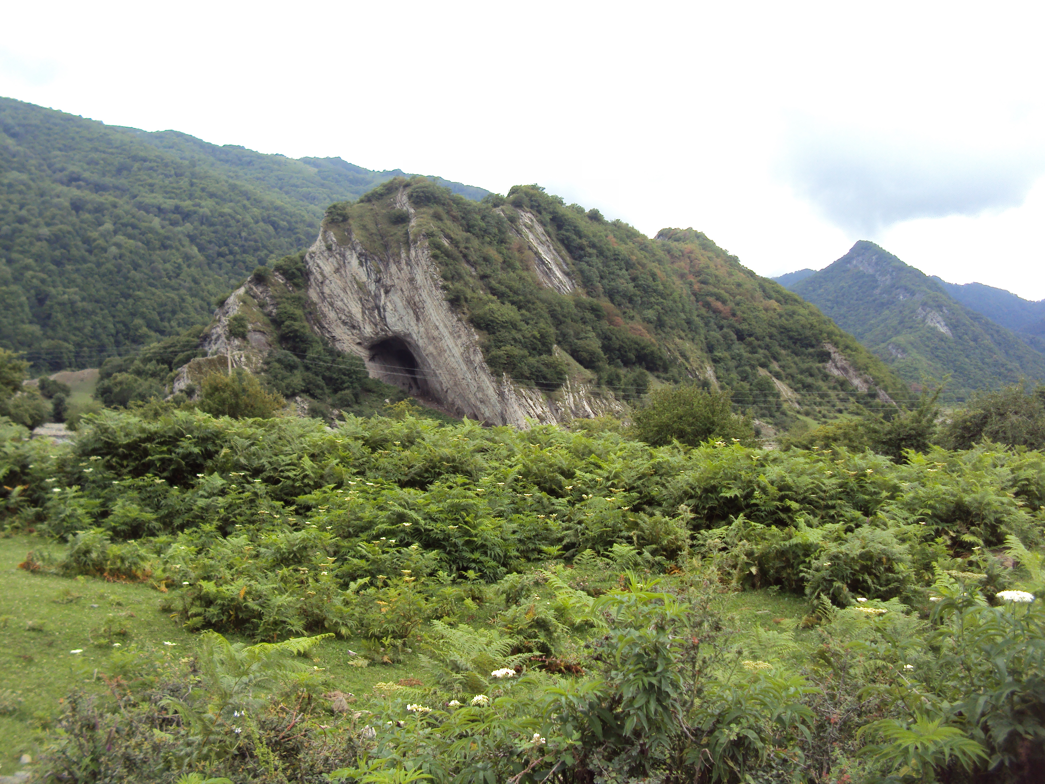 Uğan mağarasının görünüşü